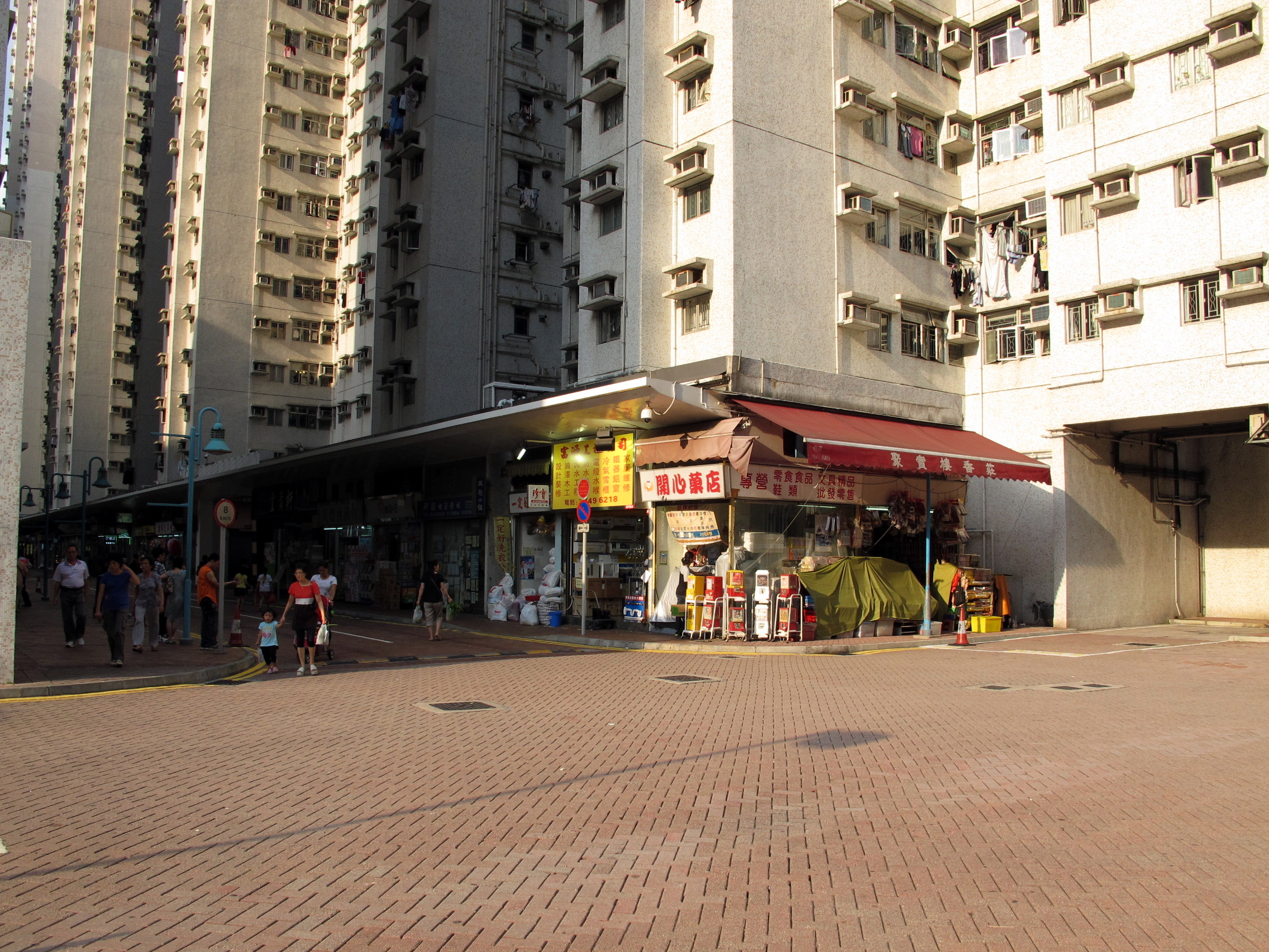 Lung Mun Oasis GF Stores